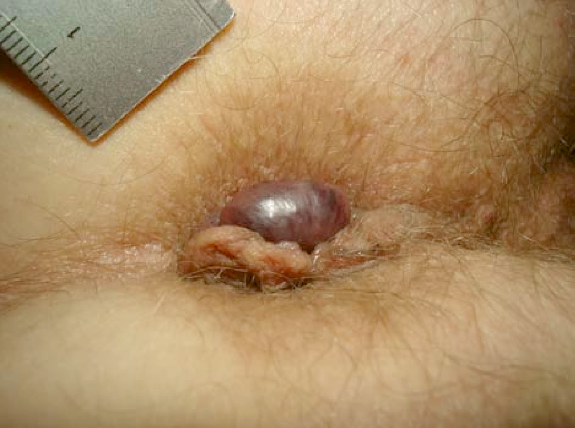 Eine Perianalthrombose (fälschlich auch als "äußere Hämorrhoide" bezeichnet)